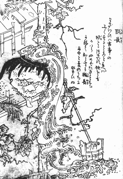 Kameosa (瓶長, A possessed sake jar) from the Hyakki Tsurezure Bukuro (百器徒然袋)